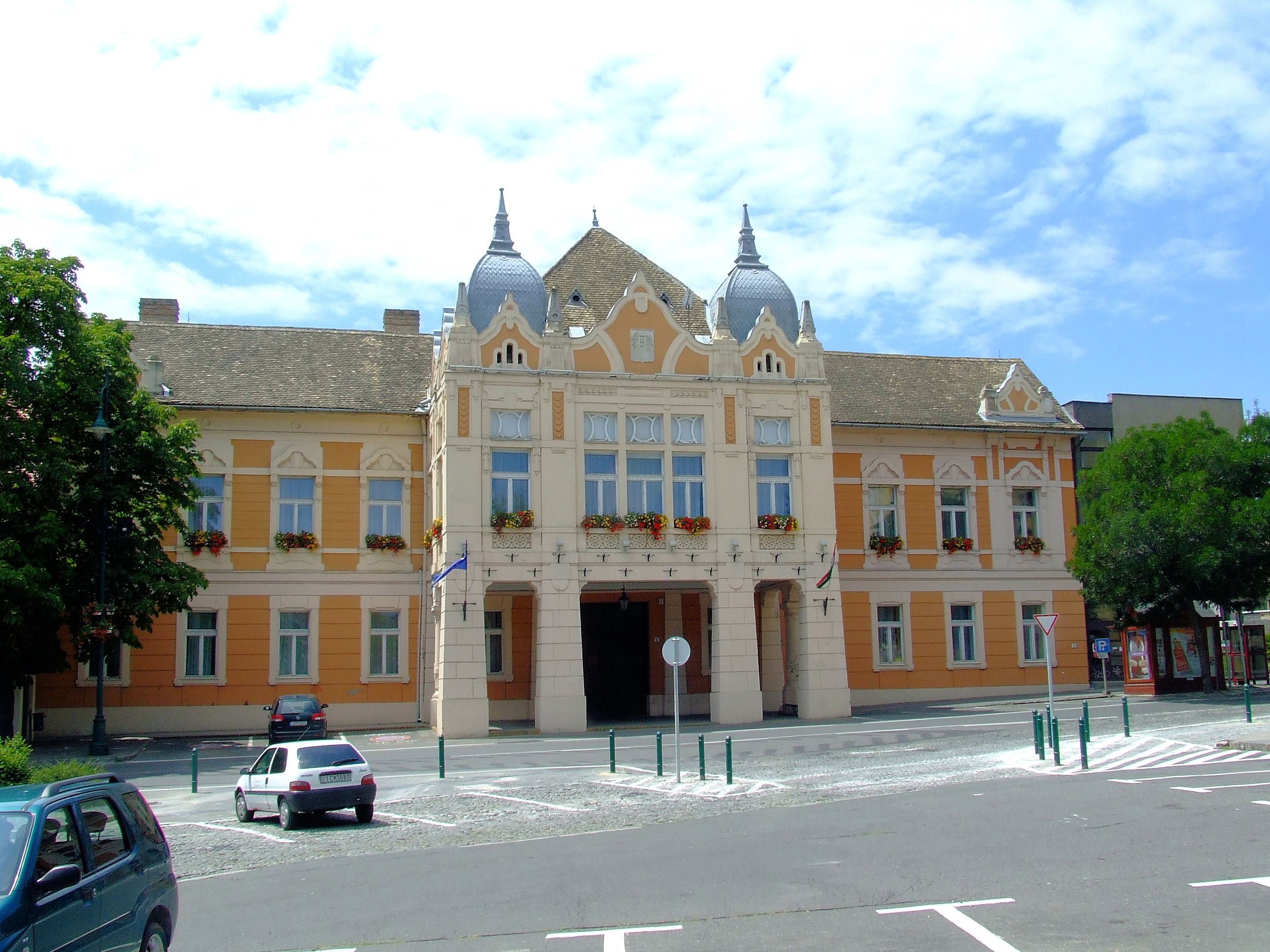 A szekszárdi városháza. Épült 1842 és 1846 között Tormay (Krenmüller) Károly megyei főorvos és Huber Henrik tervei szerint This is a photo of a monument in Hungary. Identifier: 8745